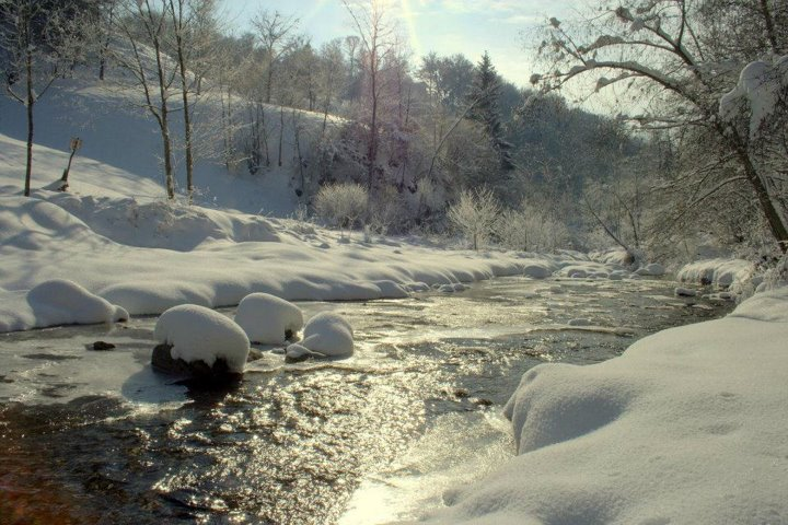 l'Agogna in una secca invernale